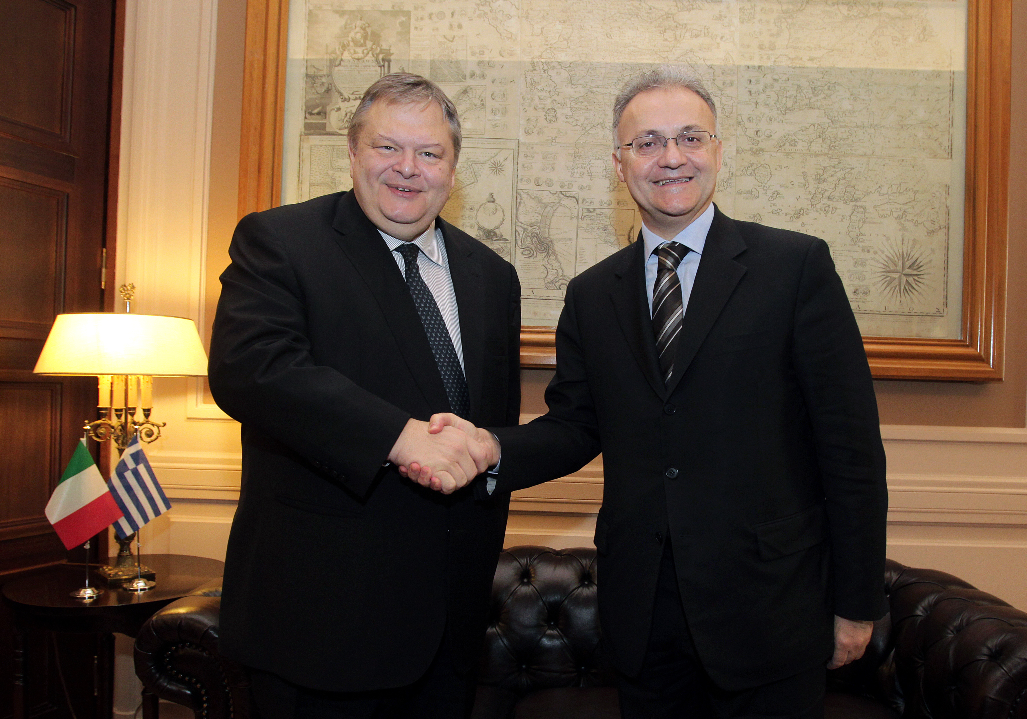 Ο Αντιπρόεδρος της Κυβέρνησης και Υπουργός Εξωτερικών, Ευάγγελος Βενιζέλος, συναντήθηκε την Παρασκευή 6 Δεκεμβρίου, στο Υπουργείο Εξωτερικών, με τον Υπουργό Άμυνας της Ιταλίας κ. Mario Mauro.